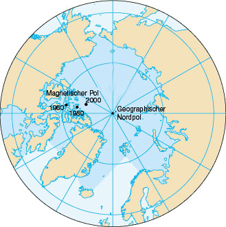 Wanderung des arktischen Magnetpols Bild Polarmeer (aus Nordpolarmeer) mit einigen Daten aus Karte verändert (public domain aus dem CIA World Factbook) Hubi 21:38, 15. Nov 2003 (CET)